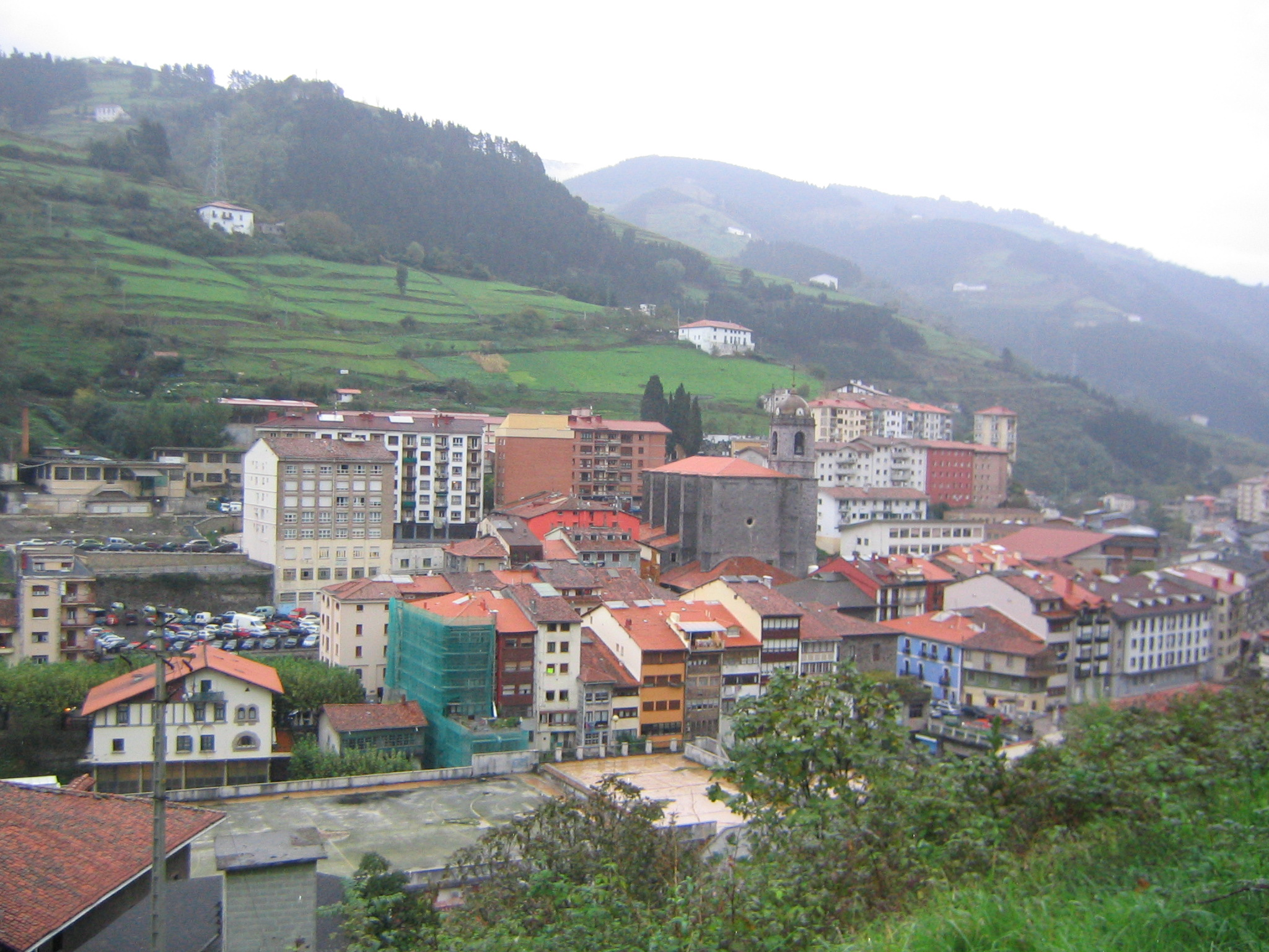 Vista de Placencia de las Armas - Soraluze en Guipúzcoa, País Vaco, España.